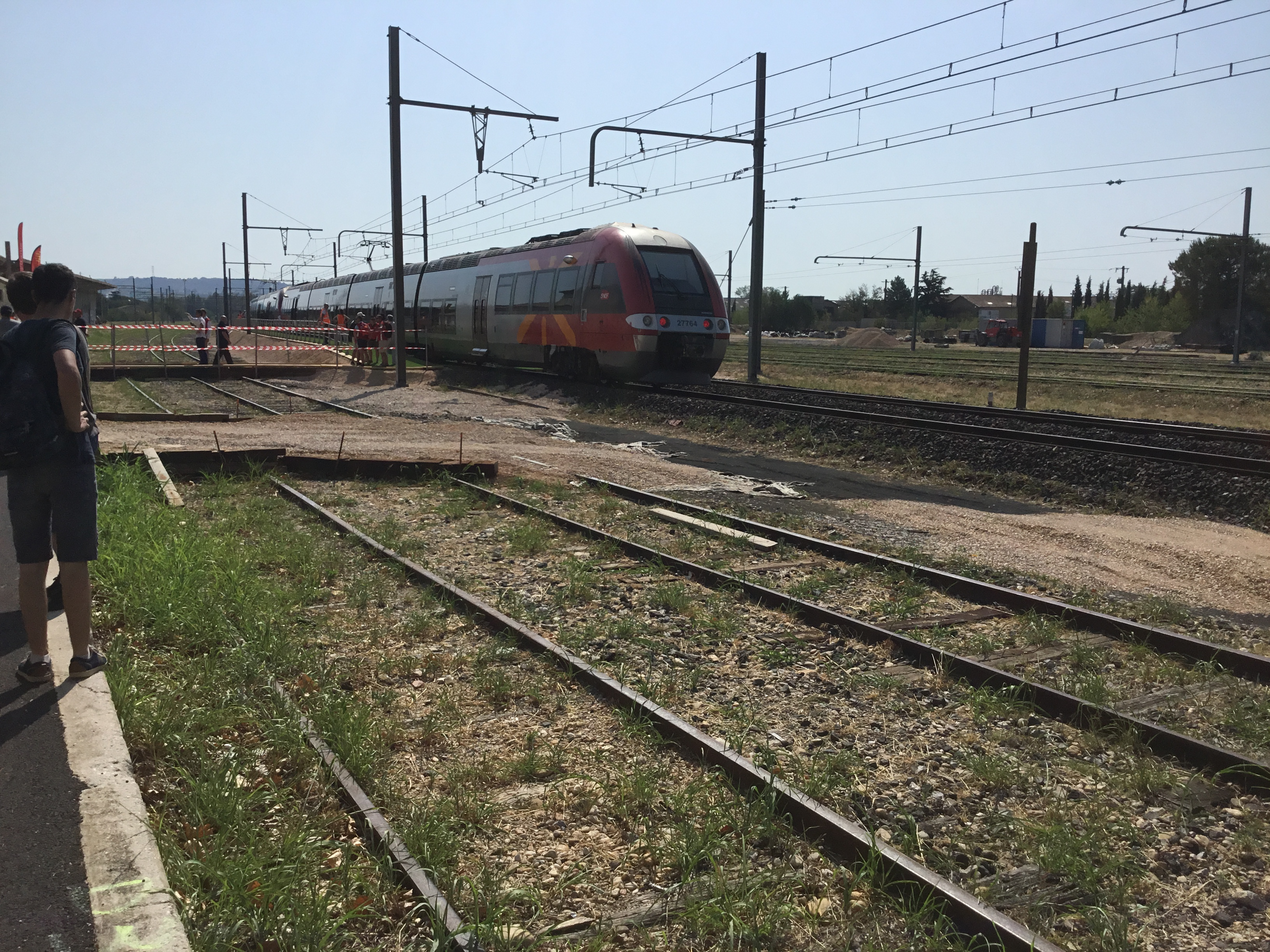 AGC livrée Languedoc-Roussillon en gare de Remoulins, le 23 Juillet 2019 stationée sur le quai provisoire construit pour l'occasion